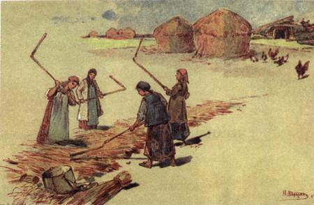 Каразин Н.Н. Молотьба. 1902. Акварель. Шангина И.И. Русский традиционный быт.